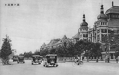 霞ヶ関の煉瓦街 Kazumigaseki “brick street”